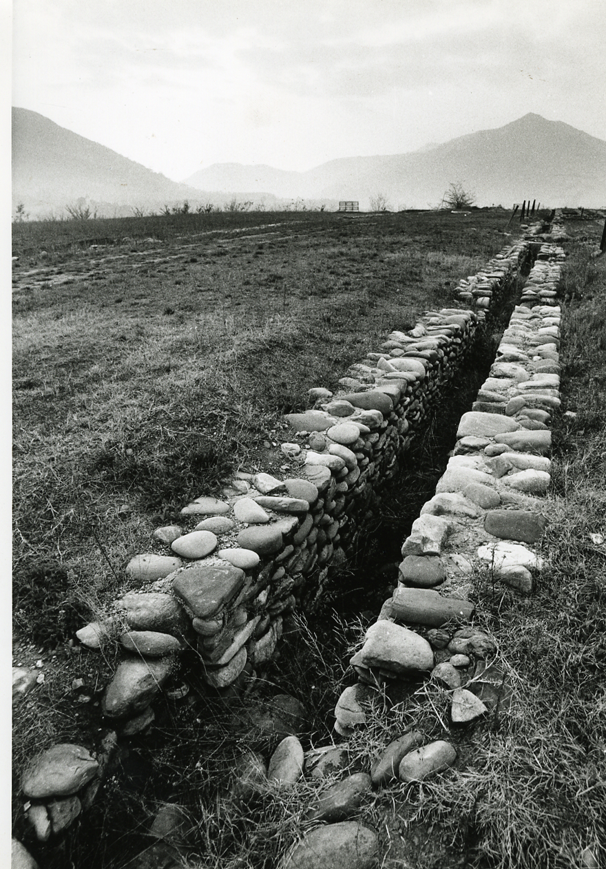 Servizio fotografico : Bologna, 1971 / Paolo Monti. - Stampe: 4 : Positivo b/n, gelatina bromuro d'argento/ carta, 24x30. - ((Al verso delle stampe manoscritti i numeri dei negativi corrispondenti: 1109/26, 1111/37, 1115/53, 1141/12. Sul coperchio della scatola, manoscritto a pennarello: "Casa rurale". - Occasione: Campagna di rilevamento dell'Appennino (terza). Appenino bolognese ed imolese, versante occidentale del Reno. - Fonte: Camicia di Soprintendenza per i Beni Artistici e Storici: I. Carteggi/ Bologna (1981/06/29), presso Archivio Paolo Monti